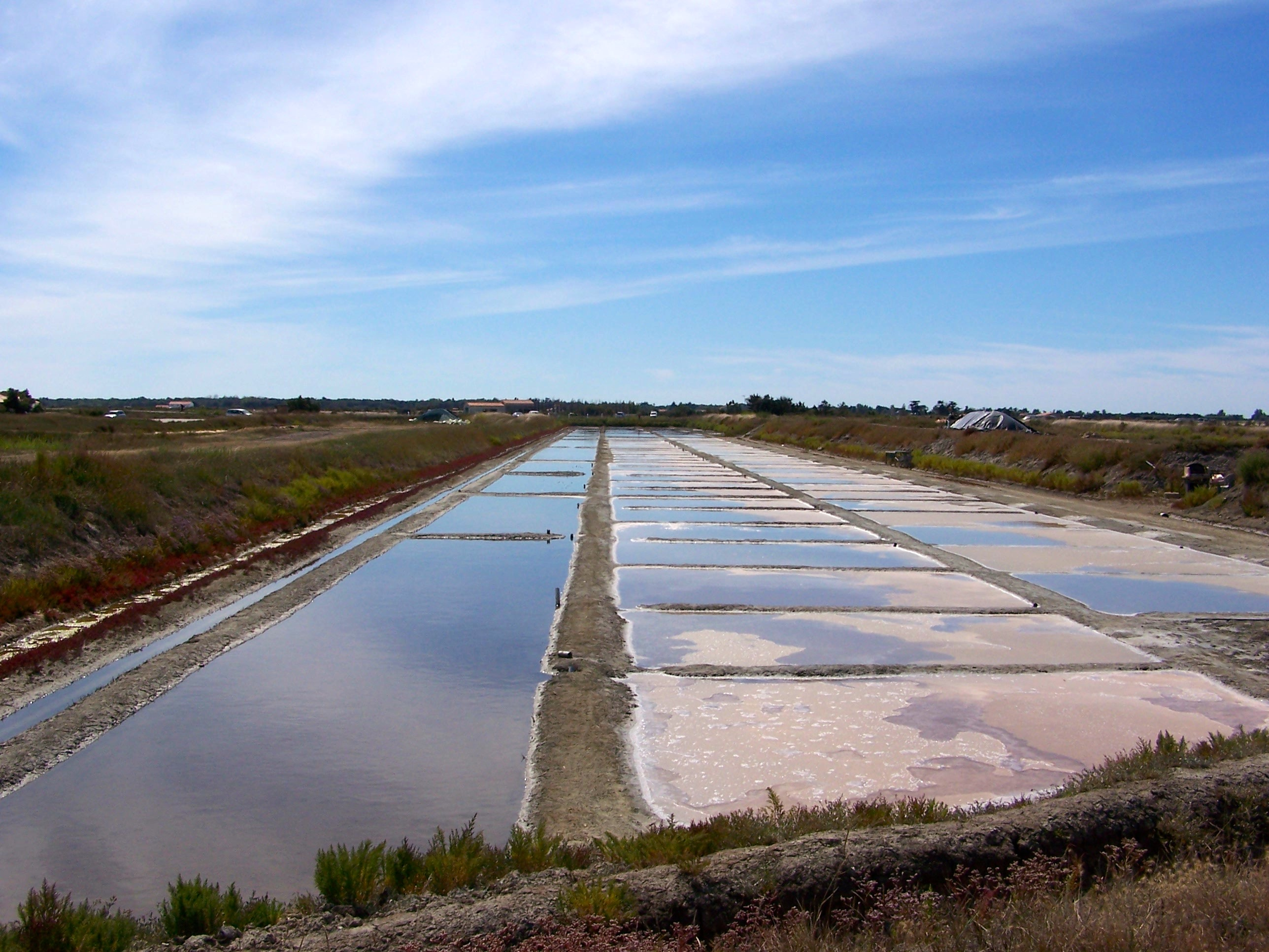 L’exploitation des marais salants remonte au 15ème siècle, au 19ème siècle la culture du sel sur l'île de Ré est à son apogée. Les terres salicoles représentaient 18% de la surface de l’île. Après une période de déclin due à l'assèchement des marais, de nos jours l'activité refleurit, une coopérative de 40 sauniers perpétuent la tradition.